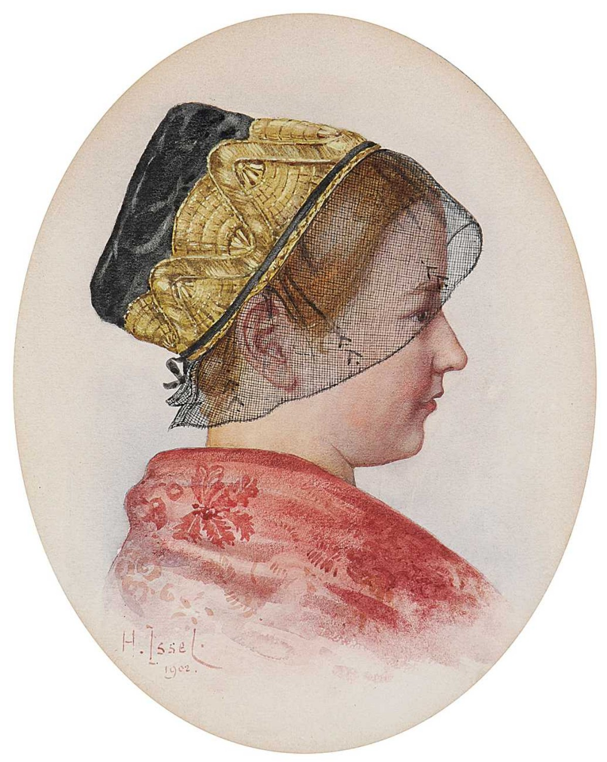 Bildnis einer jungen Frau, Aquarell, 27,5 x 22 cm